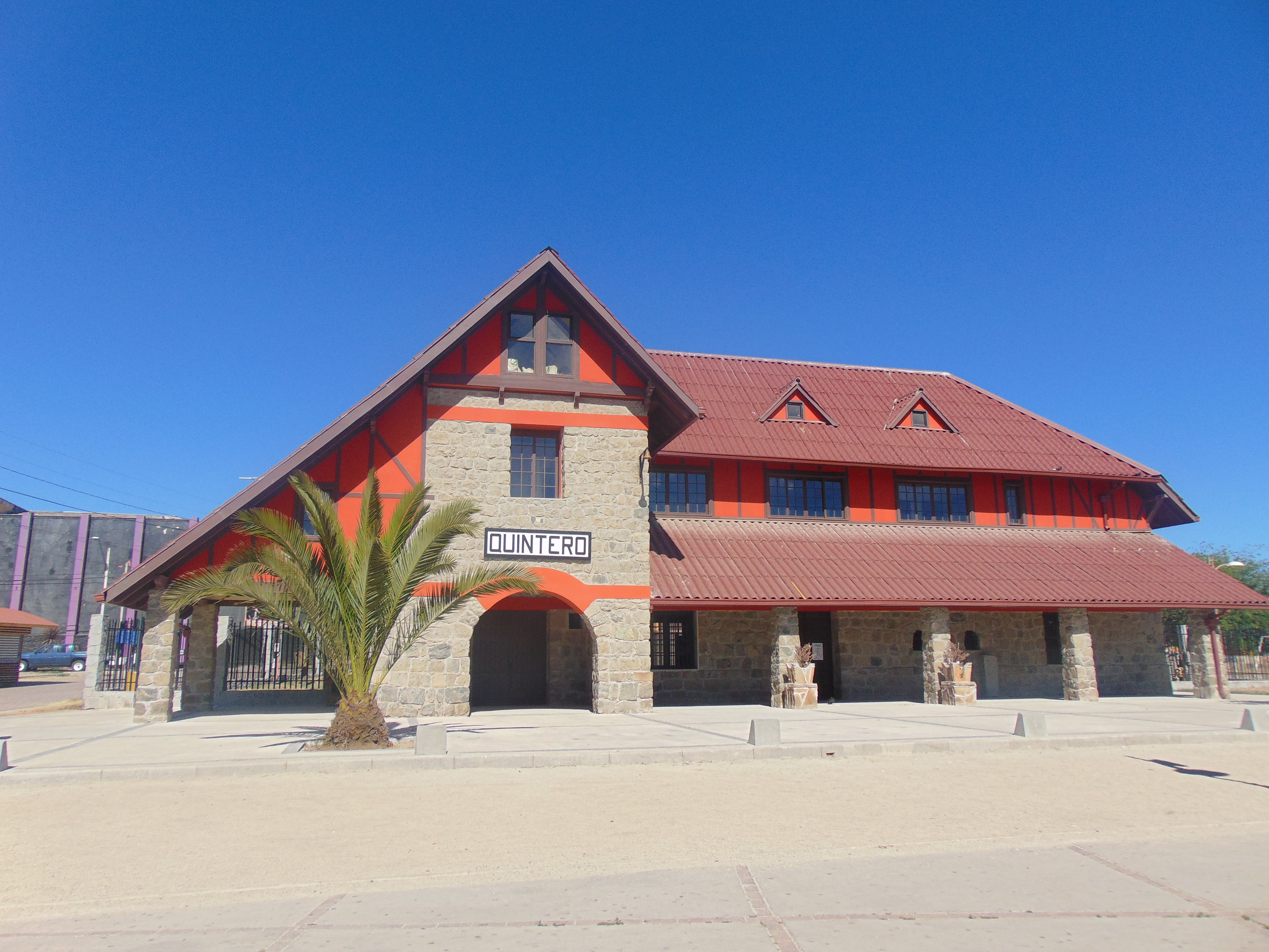 Antigua Casa Estación de Ferrocarriles. Actual Corporación de Cultura y Turismo de Quintero